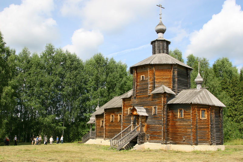 Церковь в с. Рябово